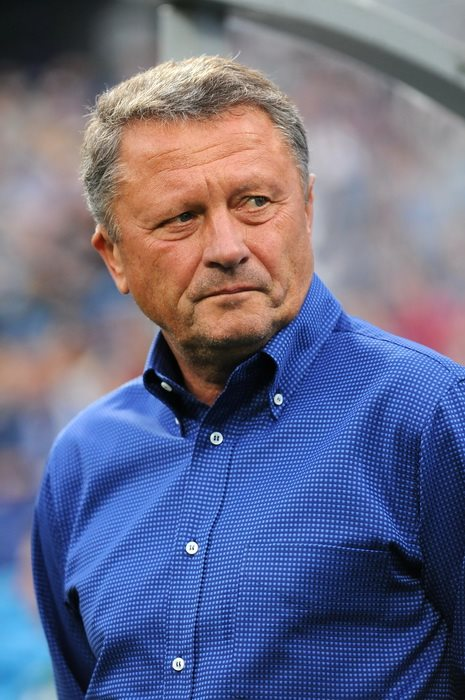 Арсенал 1:2 Металлист